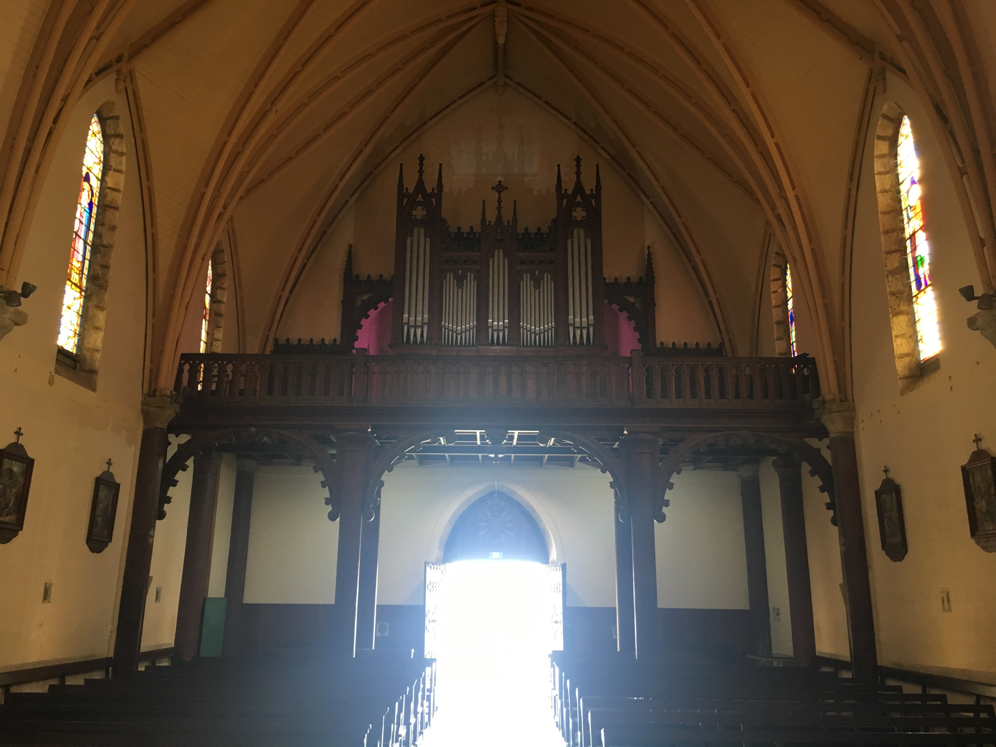 Orgue Mutin Cavaillé-Coll de la cathédrale Saint-Joseph de Nouméa (1908).